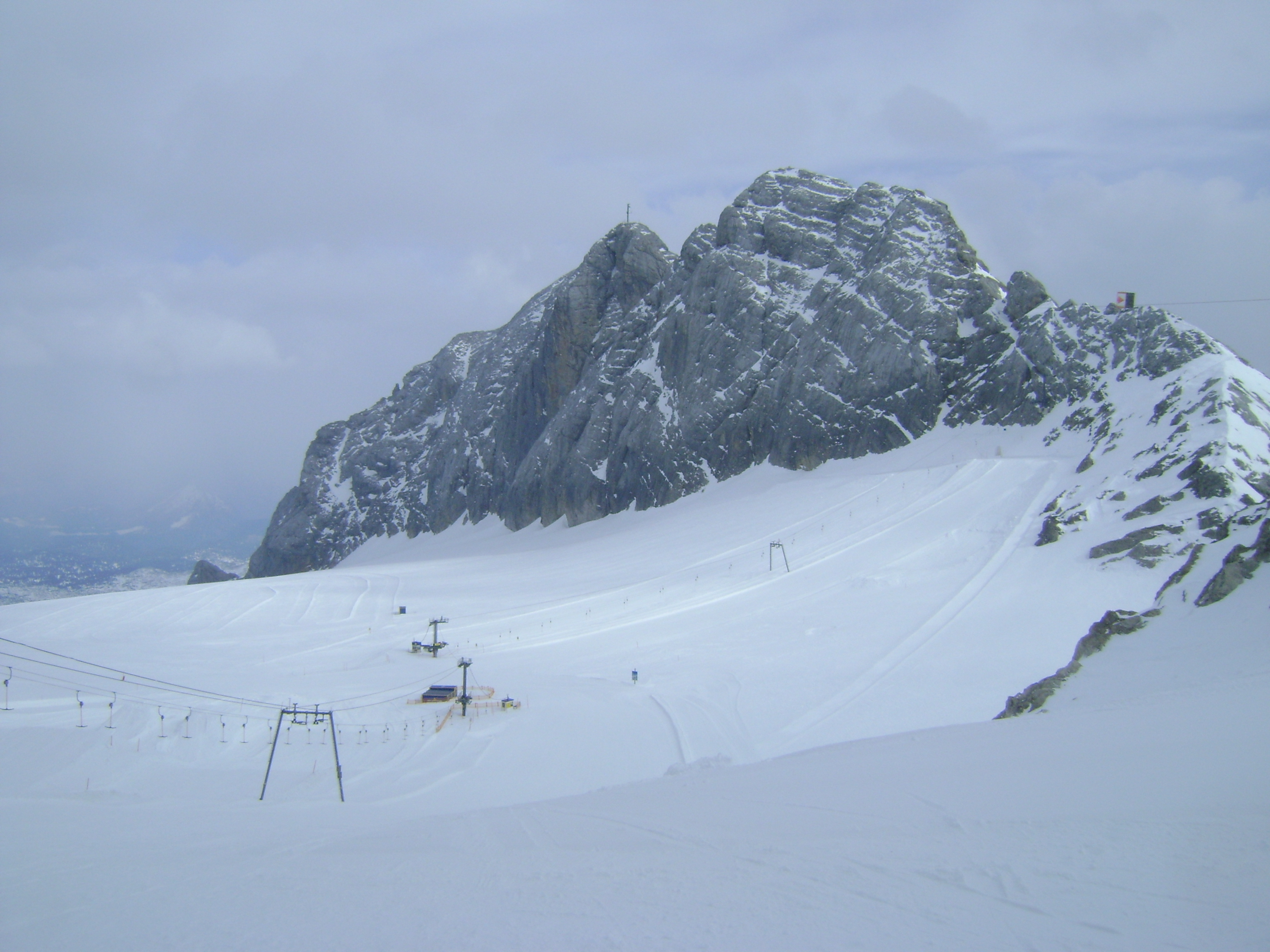 Stacja narciarska na lodowcu Schladminger z widocznym szczytem Große Koppenkarstein, AT